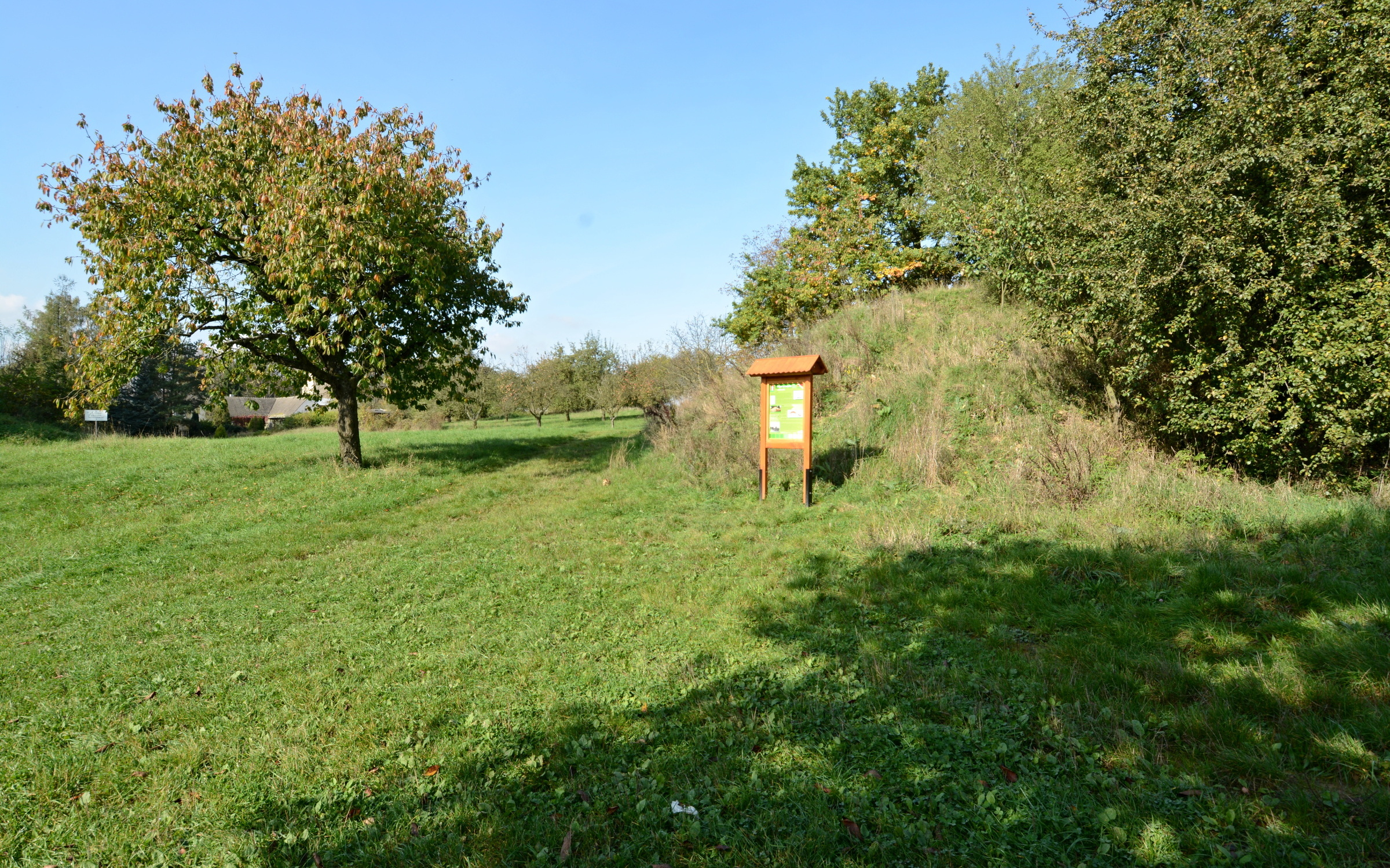 Hradiště Šance, na ostrohu nad Rokytkou, Královice (Praha), jižní konec vnějšího valu.